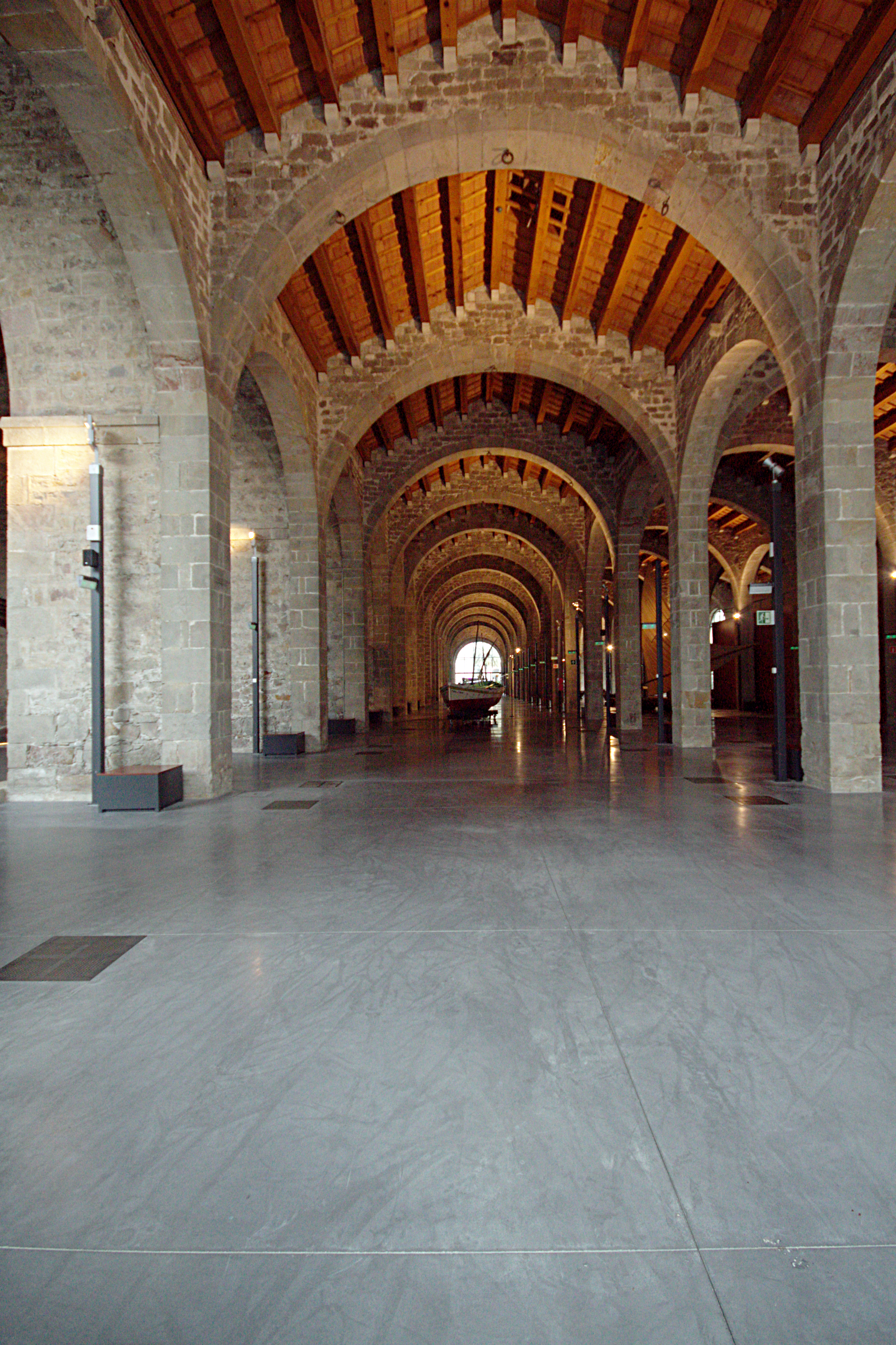 Museu Marítimo de Barcelona